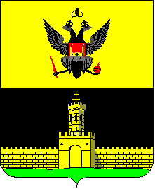 Герб Сквири 1796 року